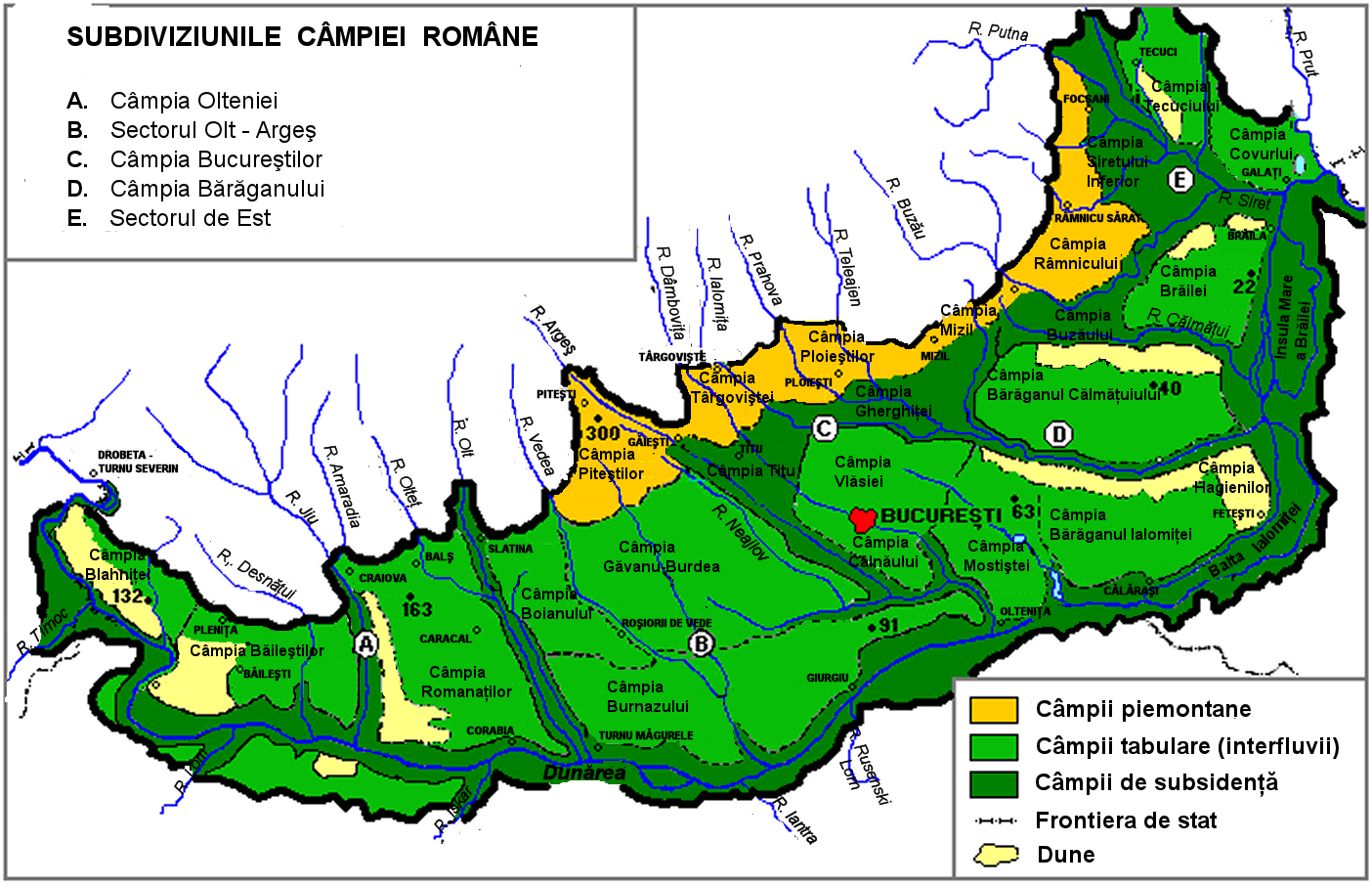 Subdiviziuni ale Câmpiei Române